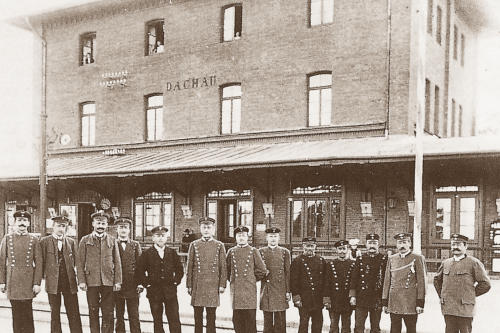 Empfangsgebäude des Bahnhofs Dachau mit versammeltem Bahnhofspersonal 1868